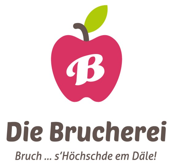 Logo der Brucher Dorfgemeinschaft für gemeinsame Aktivitäten